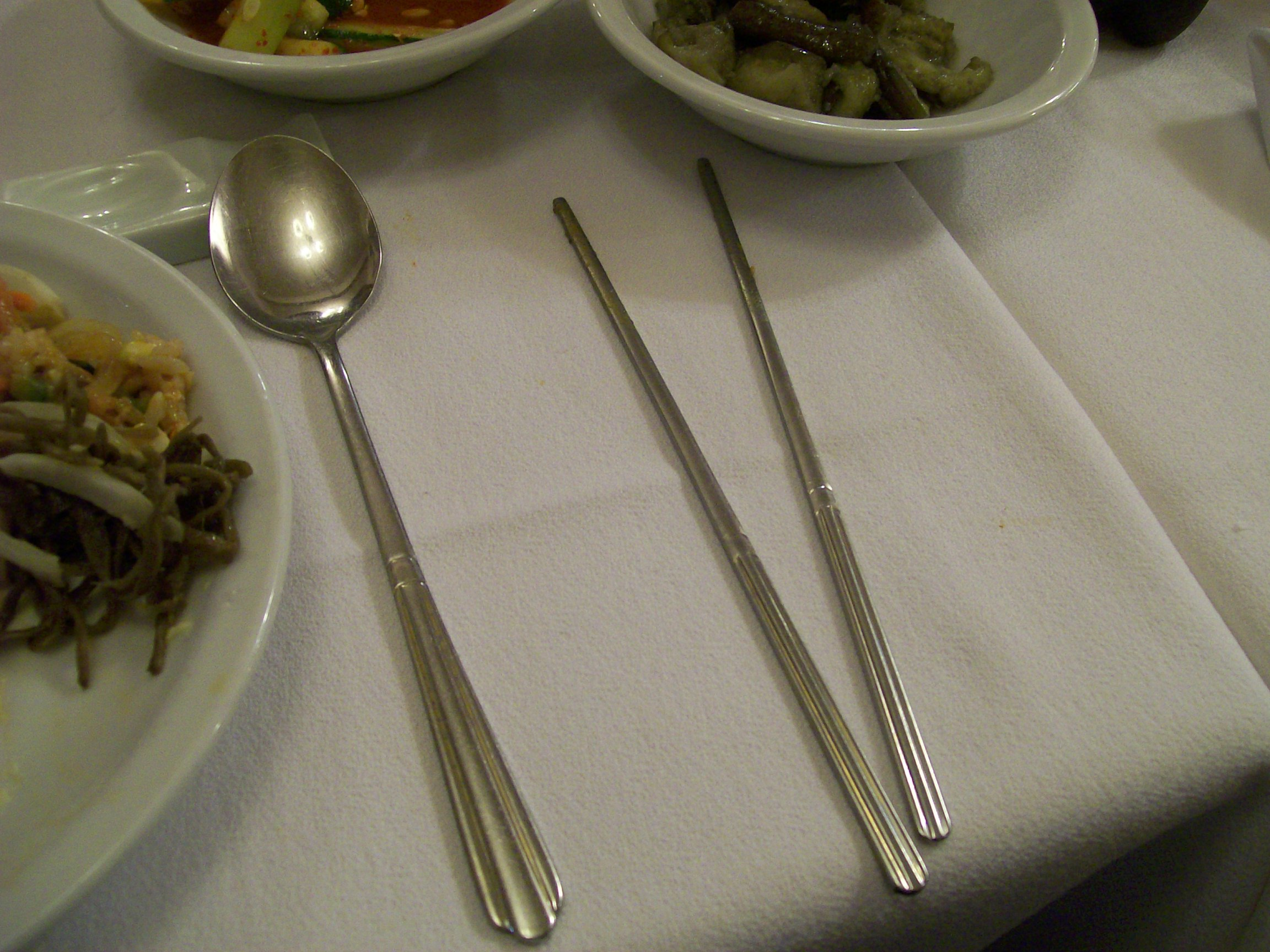 Cuchara y palitos coreanos